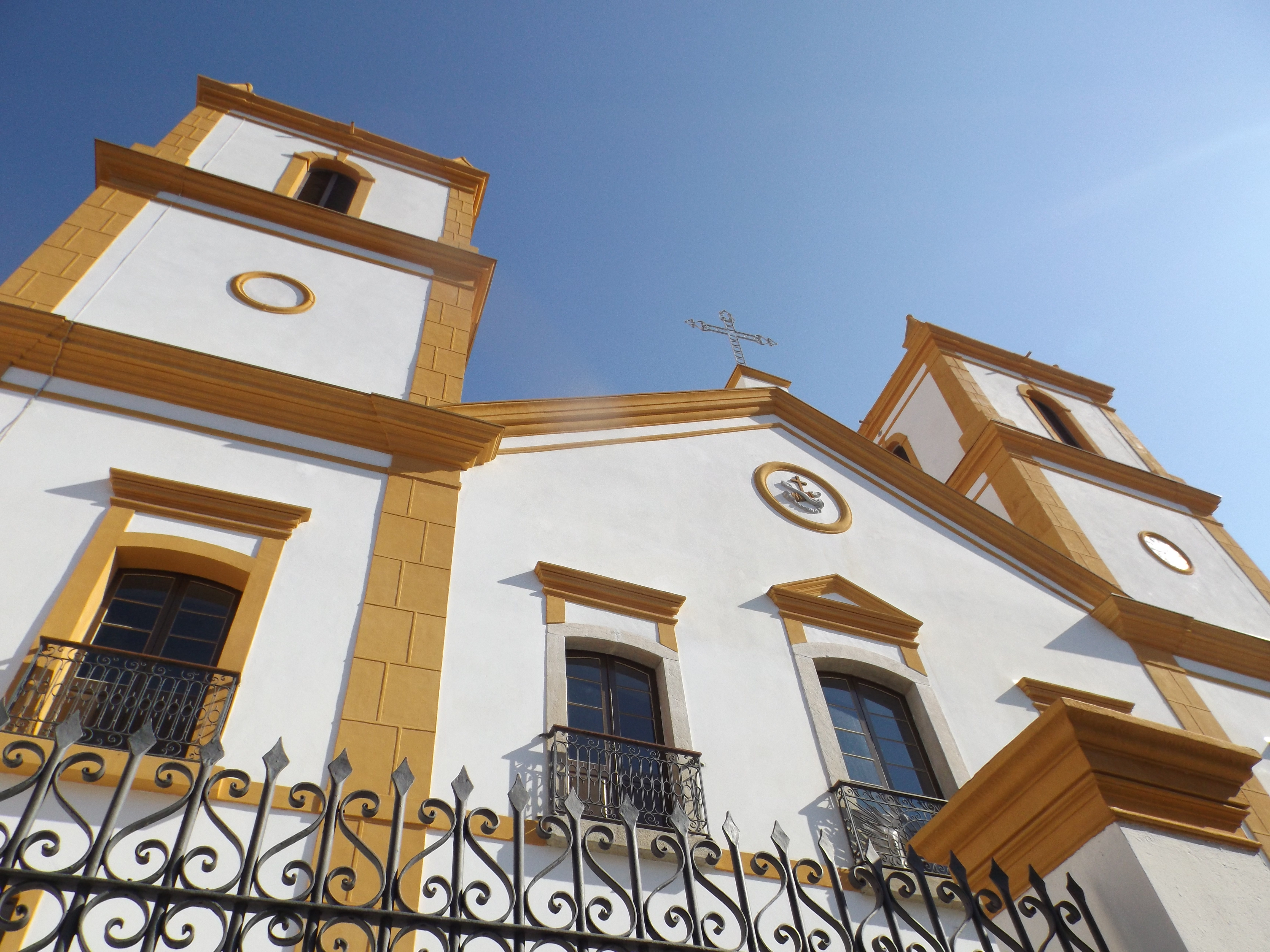 A Igreja São Francisco é uma igreja localizada na cidade de Florianópolis, Santa Catarina, no bairro centro, a ordem genitora da igreja é a mais antiga das confrarias religiosas criadas em Florianópolis. Mantém ainda grande parte senão quase toda partes da sua arquitetura original de estilo barroco e neoclássico, também conhecida como igreja da Deodoro.